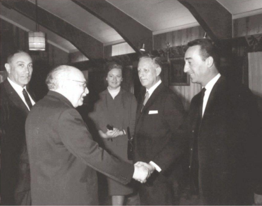 קבלת פנים בבית נשיא המדינה, זלמן שזר, לפדויי שבי ממצרים. בתמונה, מימין לשמאל: מייק הררי, וולפגנג לוץ ורעייתו, זלמן שזר ומאיר עמית